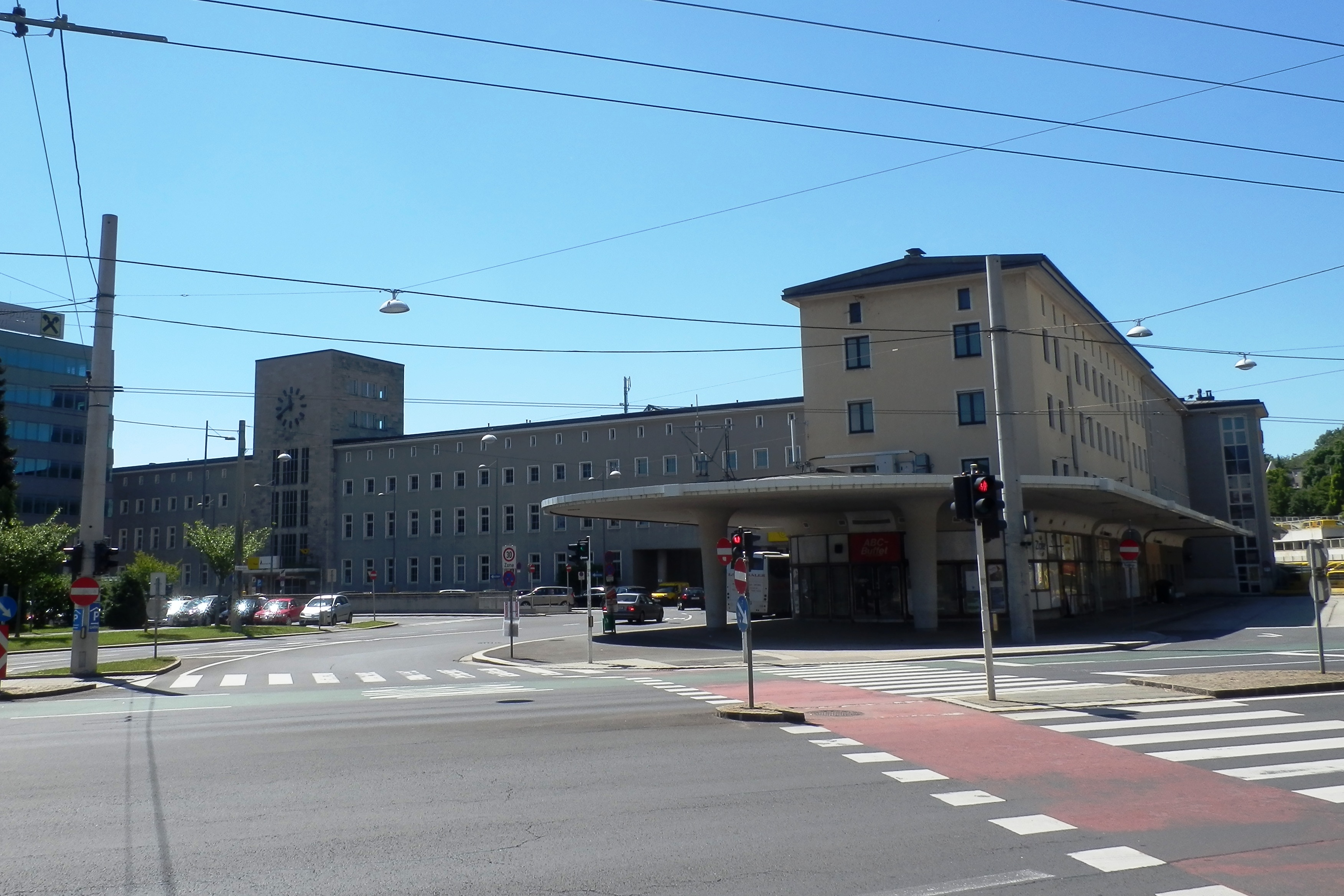 Bahnhofpostamt und ehemalige Postbusabfahrtsstelle - Linz Bahnhofplatz